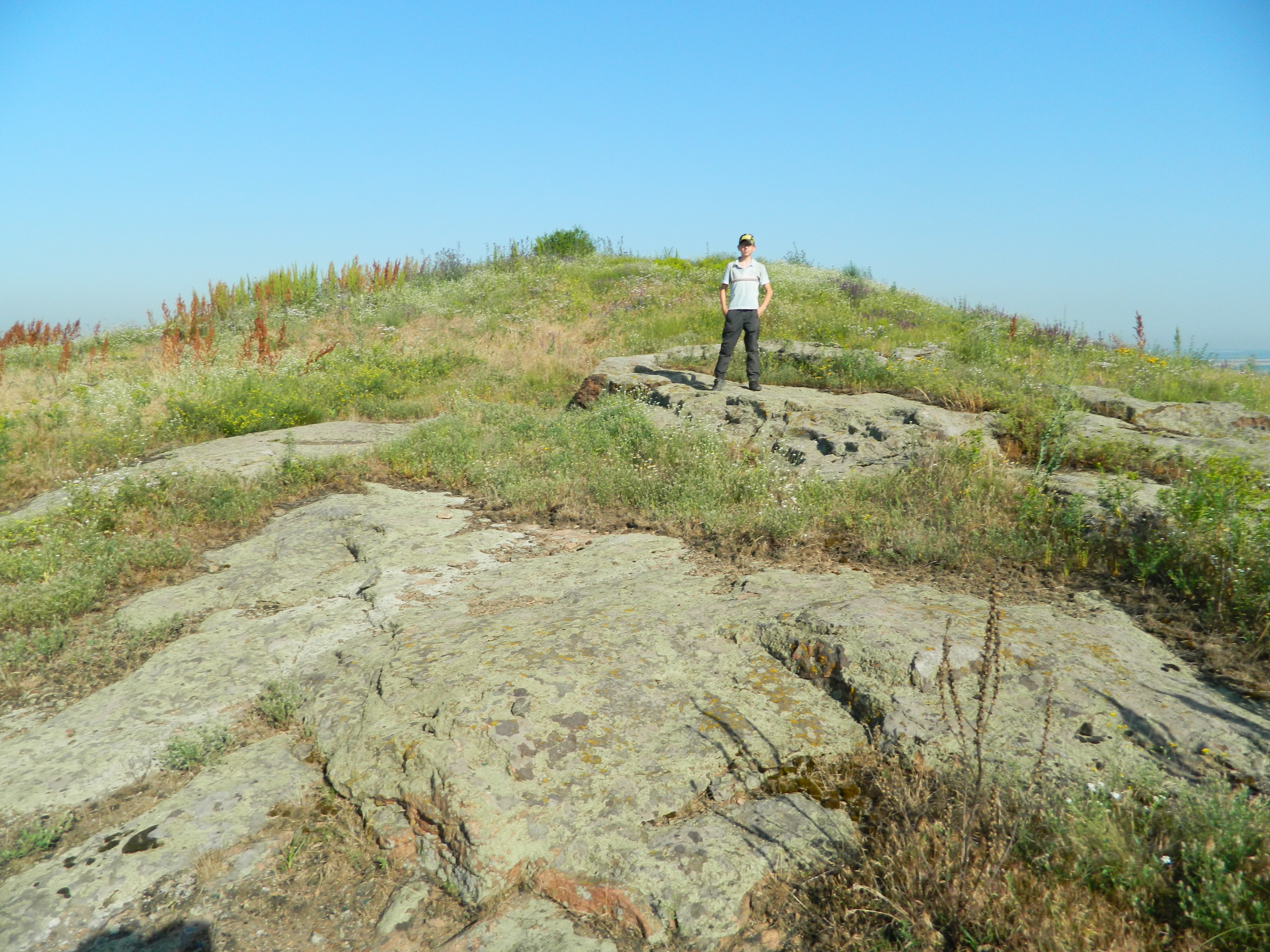 «Ланцевська кам'яна могила», Куйбишевський р-н, на захід від с.Ланцево